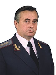 Розенко